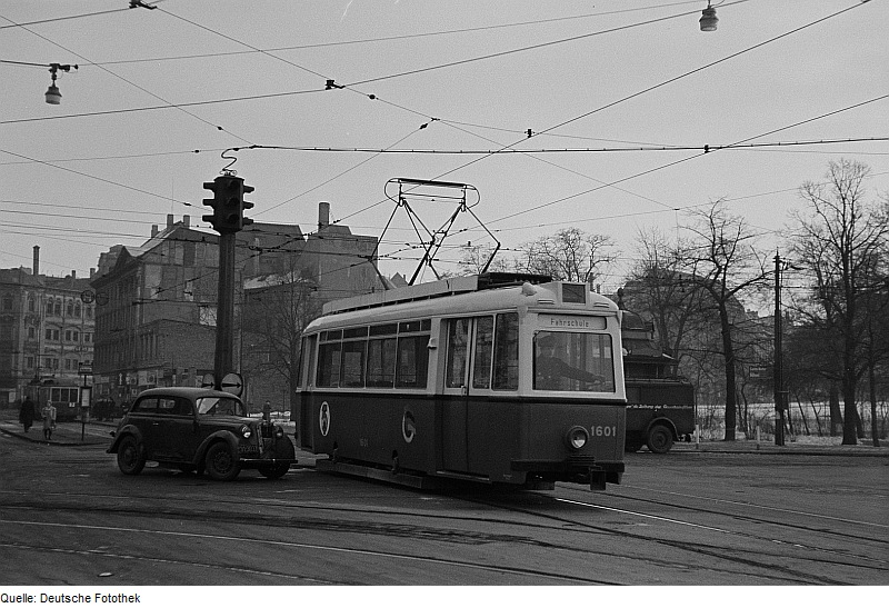 Original image description from the Deutsche FotothekStraßenbahn an einer Kreuzung in der Innenstadt